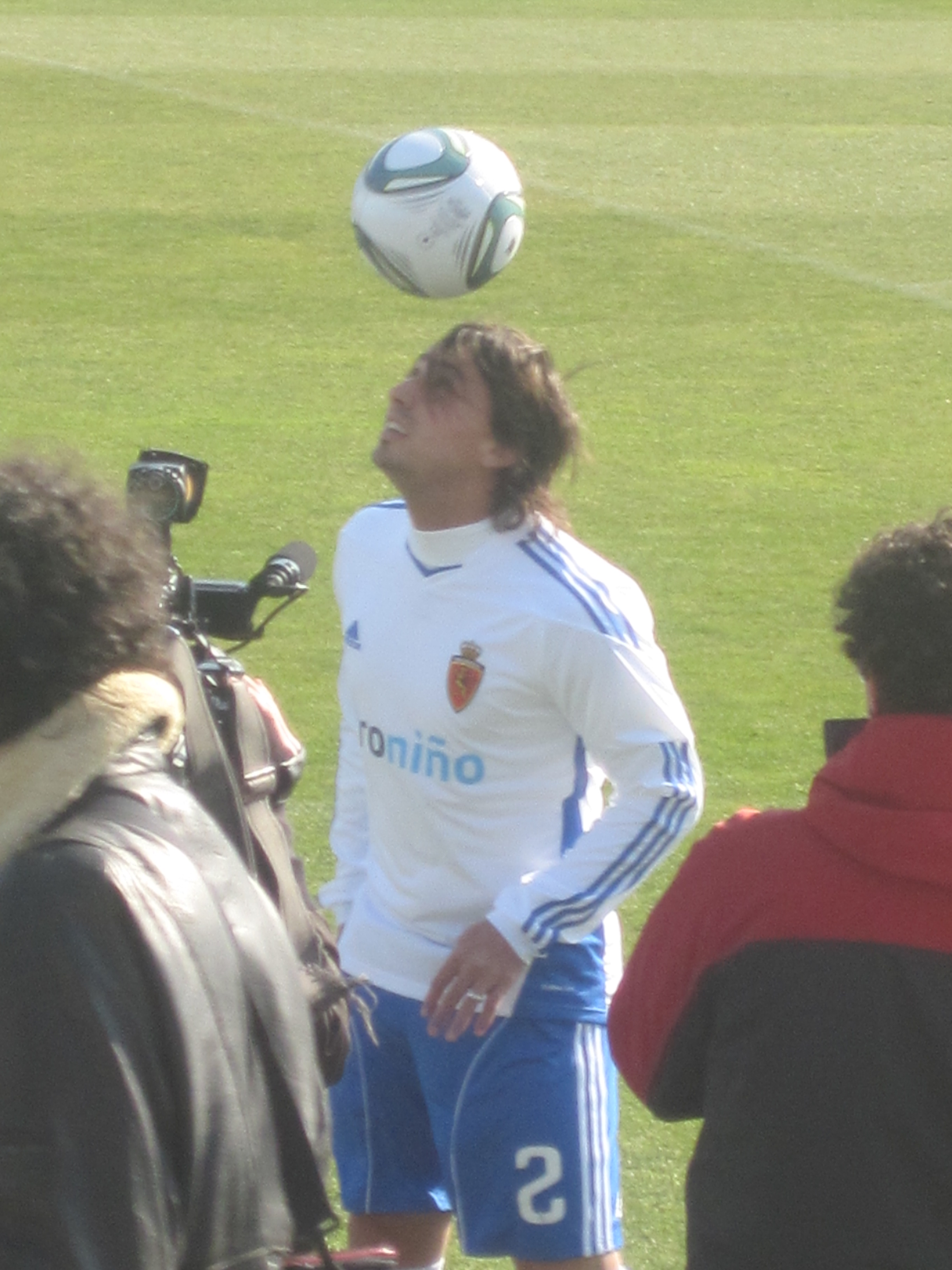 El jugador del Real Zaragoza Pablo Sebastián Álvarez en el día de su presentación.